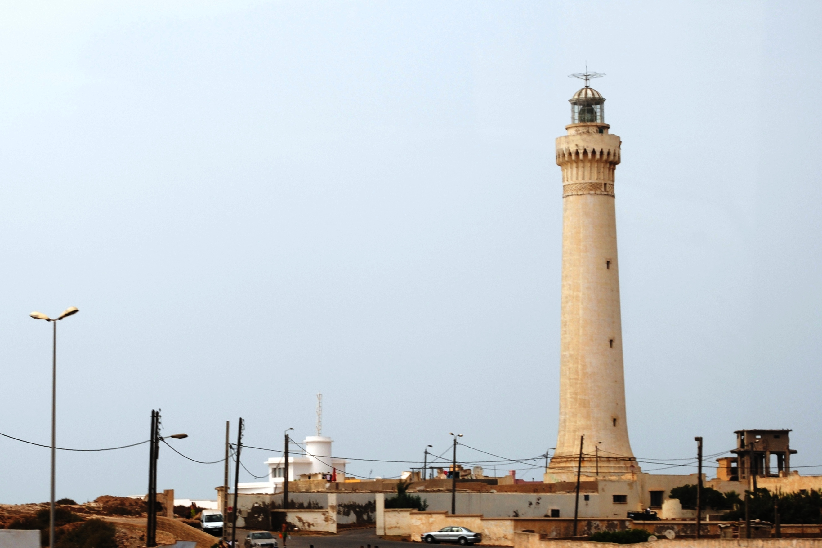 Le phare d'El Hank, Casablanca, Maroc